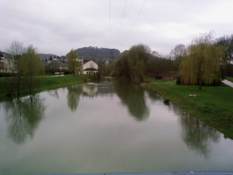 Orne (rivière) : Photo prise sur le pont entre Clouange (rive gauche, à droite de la photo) et Rombas (rive droite).